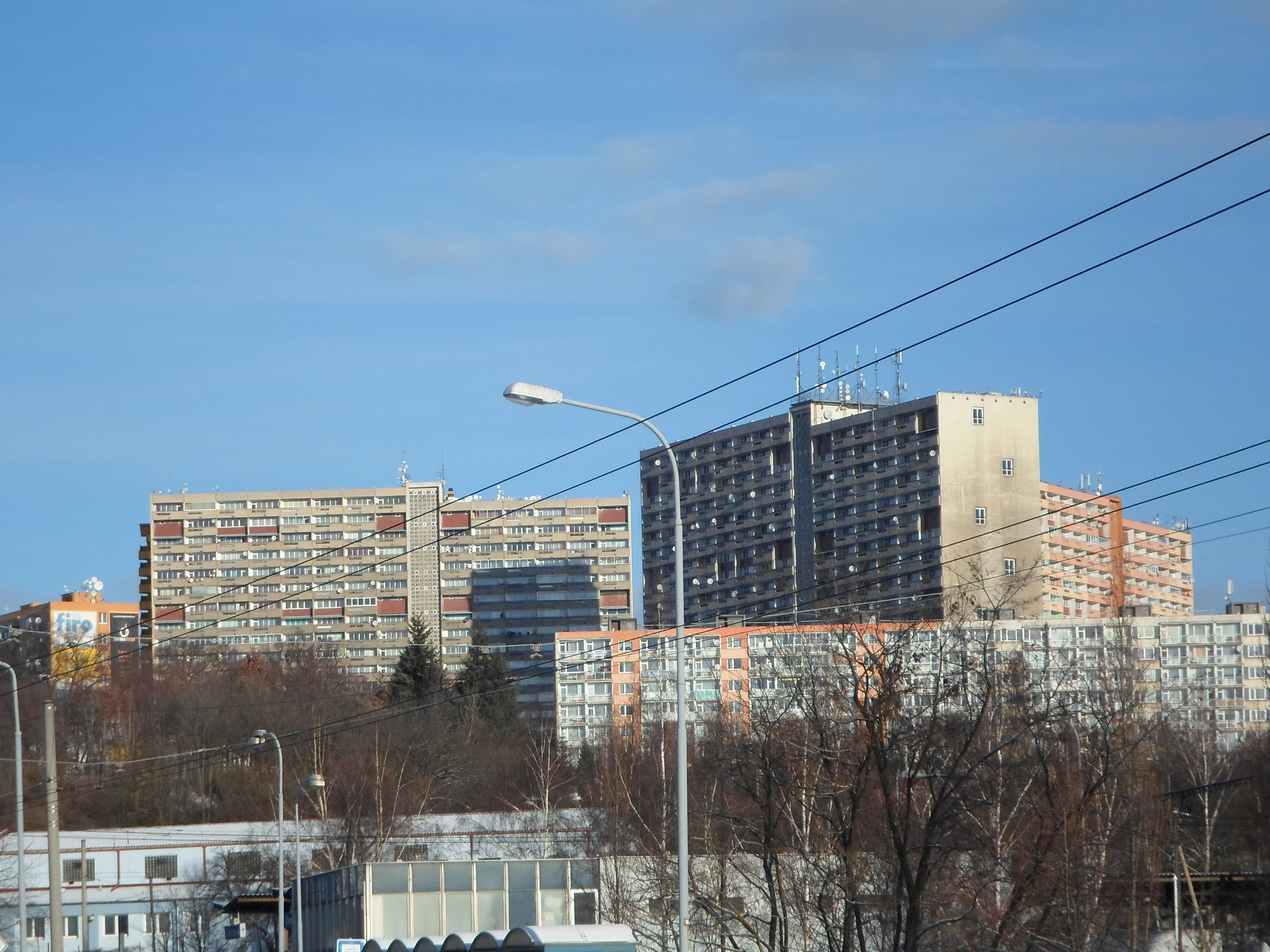 Chomutov - Panelové výškové domy - Experimenty